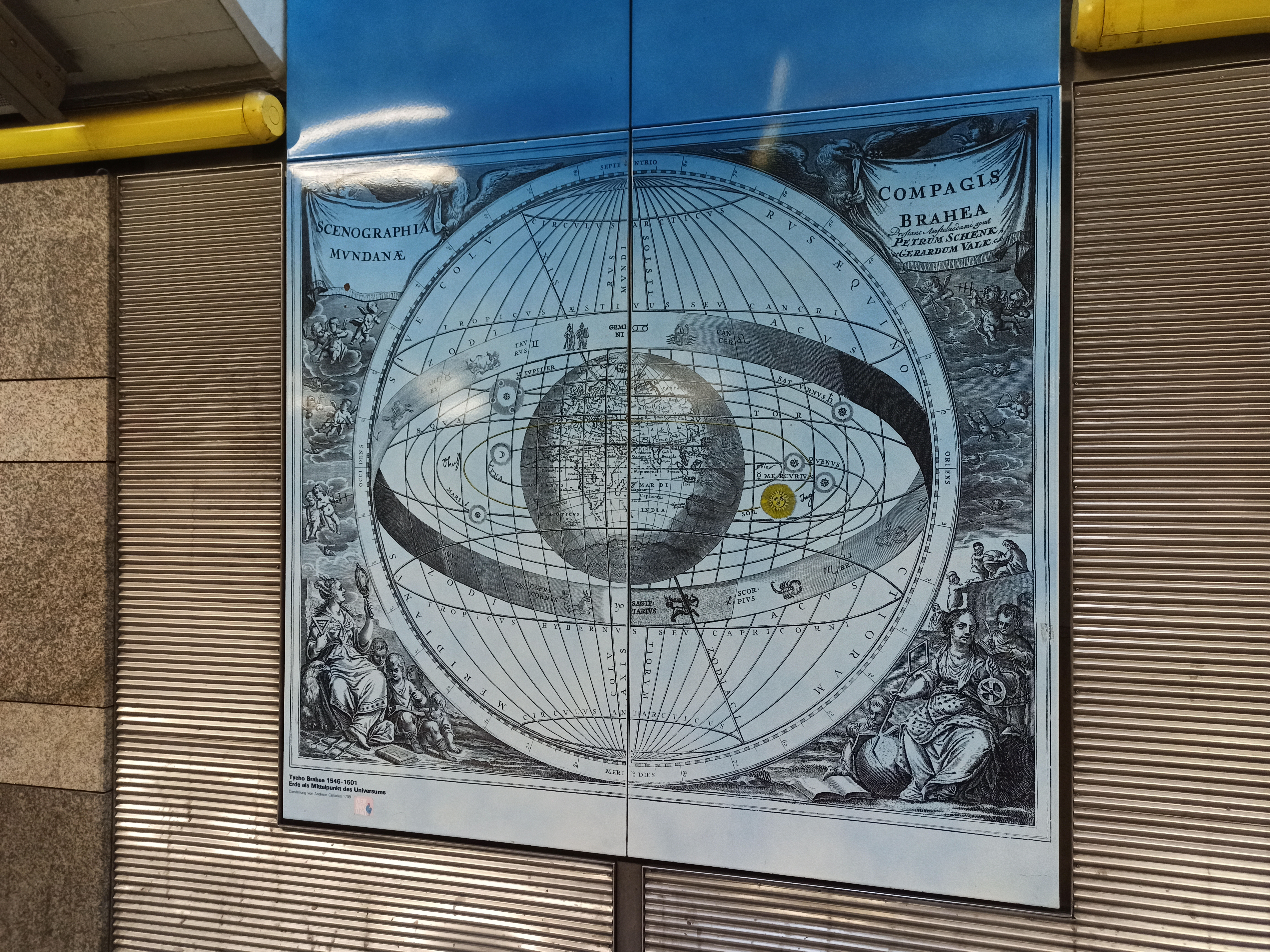 Stadtbahn Hannover, U-Bahnhof Kopernikusstraße, Grafik des geozentrischen Weltbildes nach Tycho Brahe (1546-1601) aus dem historischen Sternatlas Harmonia Macrocosmica, Taken on 28 June 2020